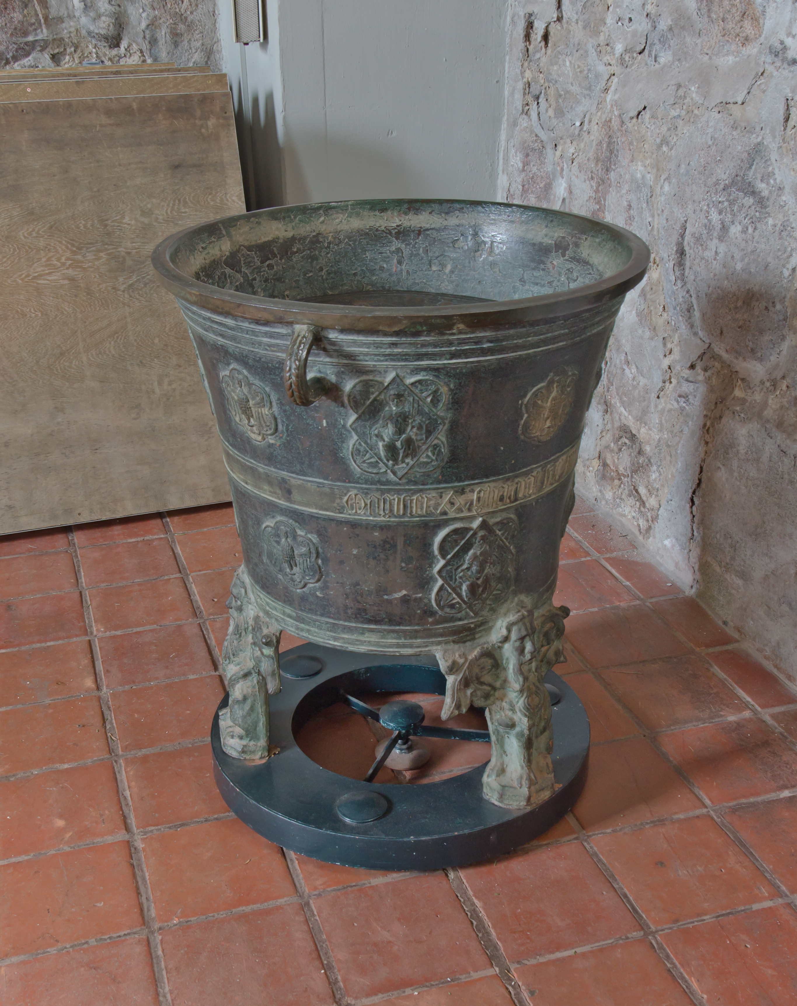 e